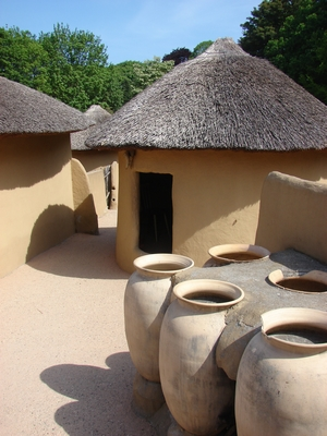 Nedersaksies: Barg_en_Delle_afrikamuseem.jpg